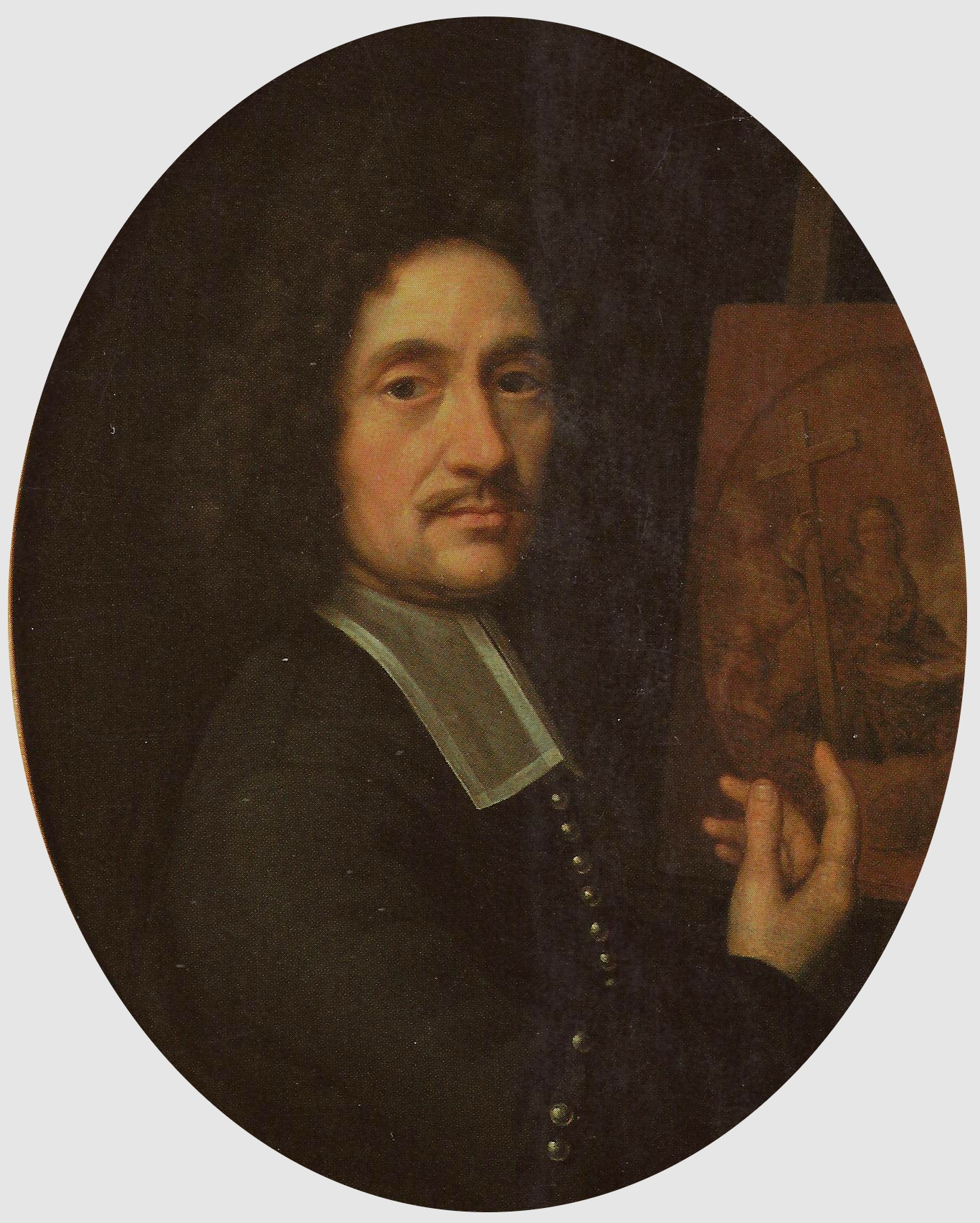 Selbstbildnis.